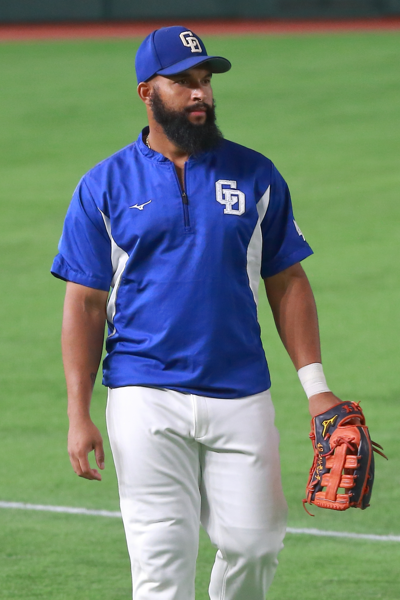 中日ドラゴンズのアルモンテ選手。2018年9月16日、東京ドームで撮影。